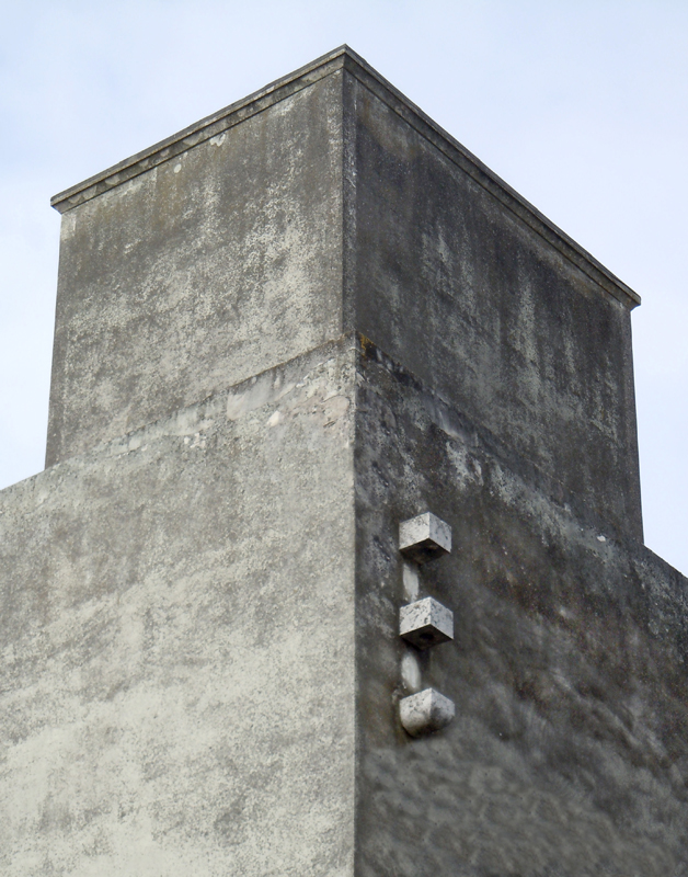 Castel Goffredo, Torre Littoria, particolare del porta asta per bandiera.